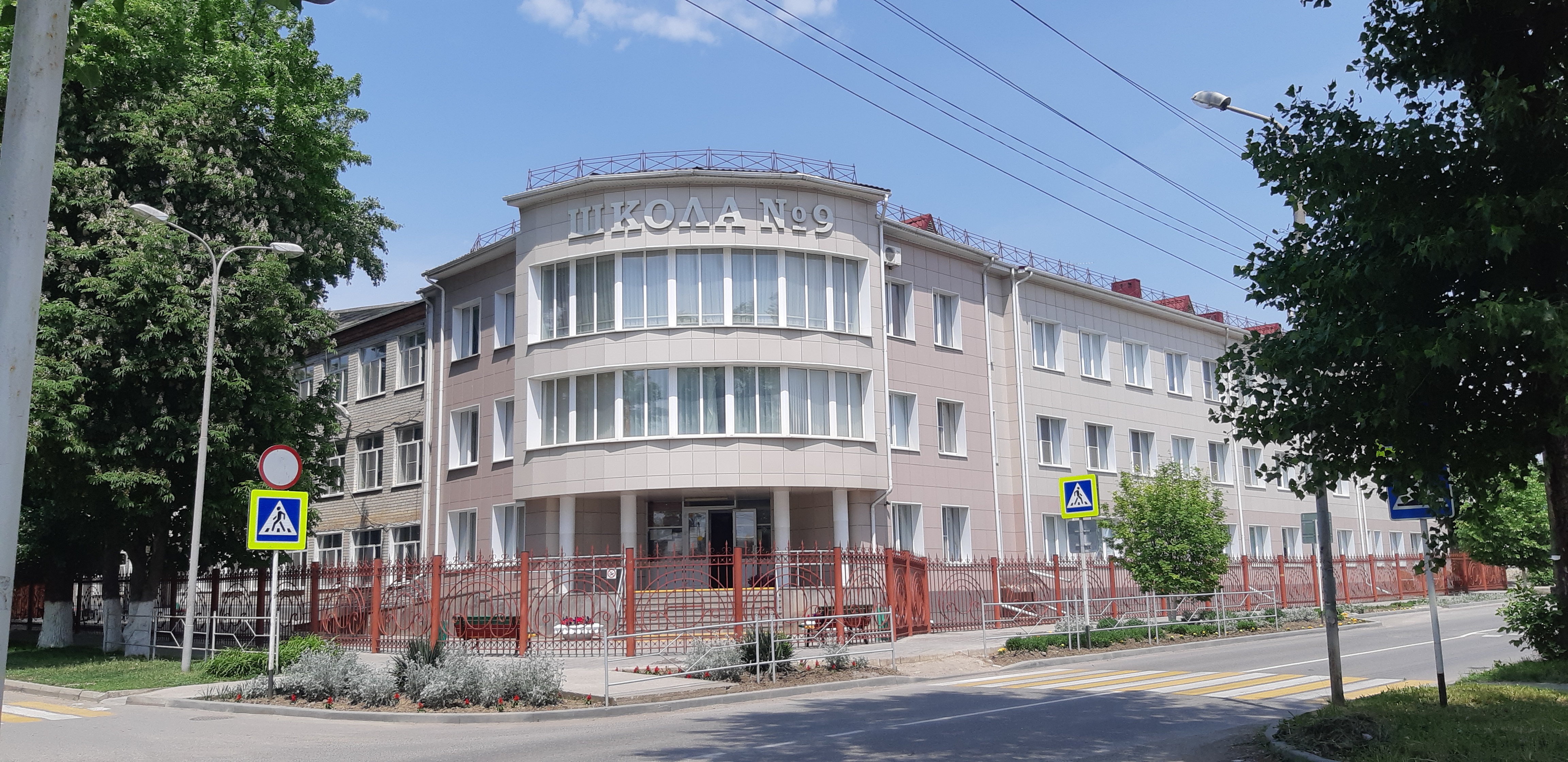 Средняя школа номер 9